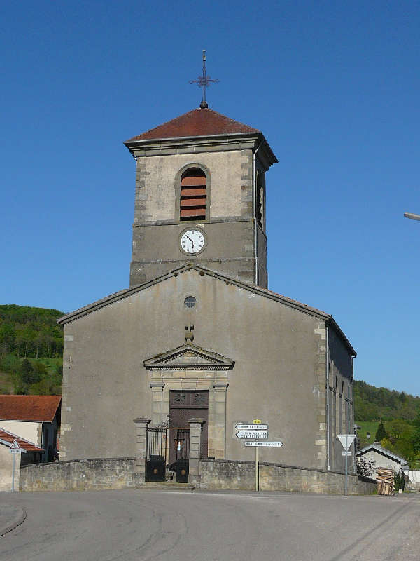 L'église du village de Crainvillers (Vosges)